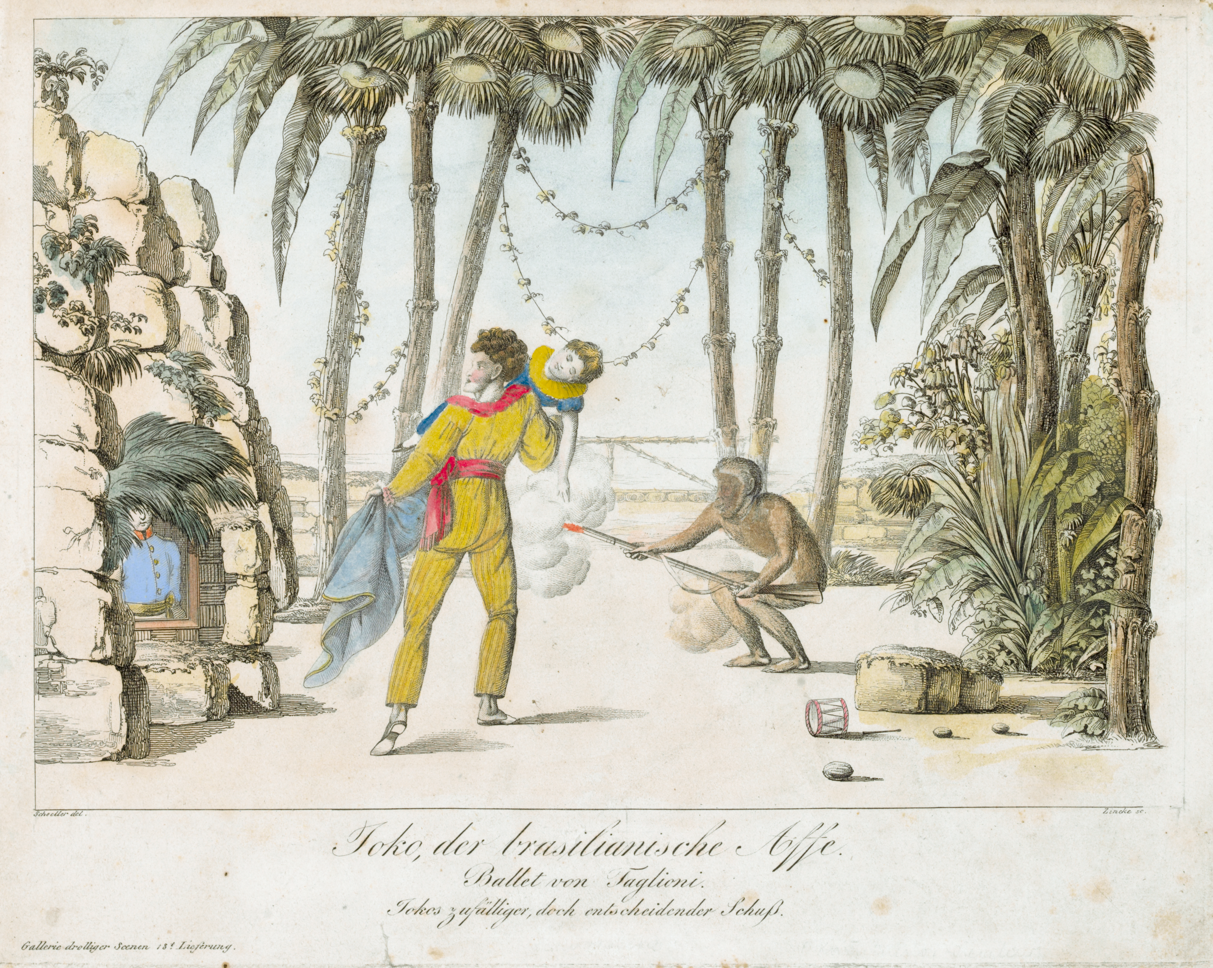 Joko, der brasilianische Affe. Ballett von Taglioni. Jokos zufälliger, doch entscheidender Schuß. Zeichnung: Johann Christian Schoeller, Kupferstich: Johann Wenzel Zinke, 1827.